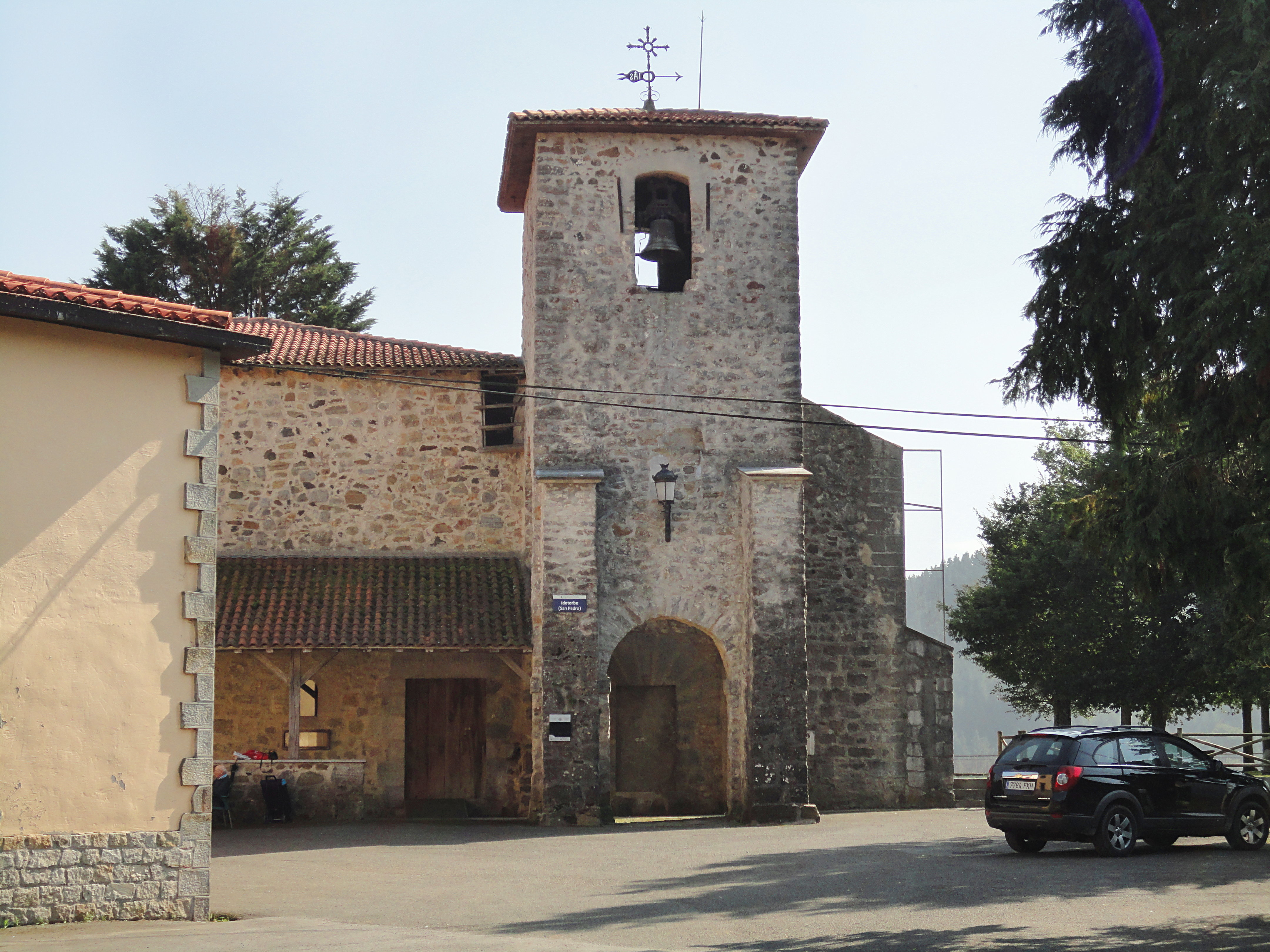 San Pedro ermita - Idotorbe